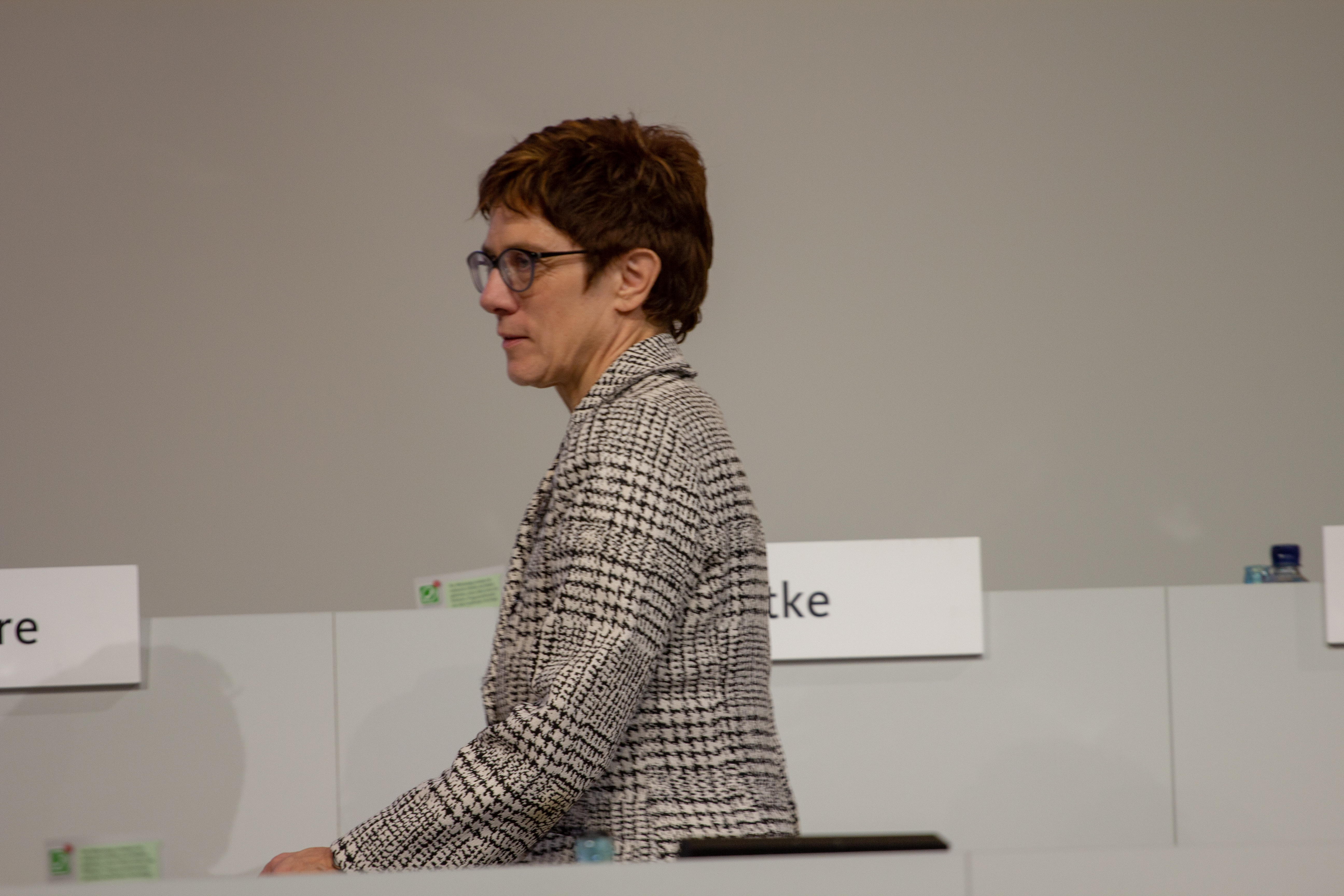 Annegret Kramp-Karrenbauer: 31 Parteitag der CDU Deutschlands in Hamburg, Messe Hamburg